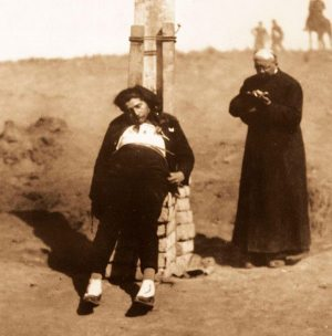 Toma de "El bolillo fatal", documental mudo de 17 minutos que documenta el fusilamiento de Alfredo Jáuregui, uno de los acusados del asesinato del ex presidente boliviano José Manuel Pando.